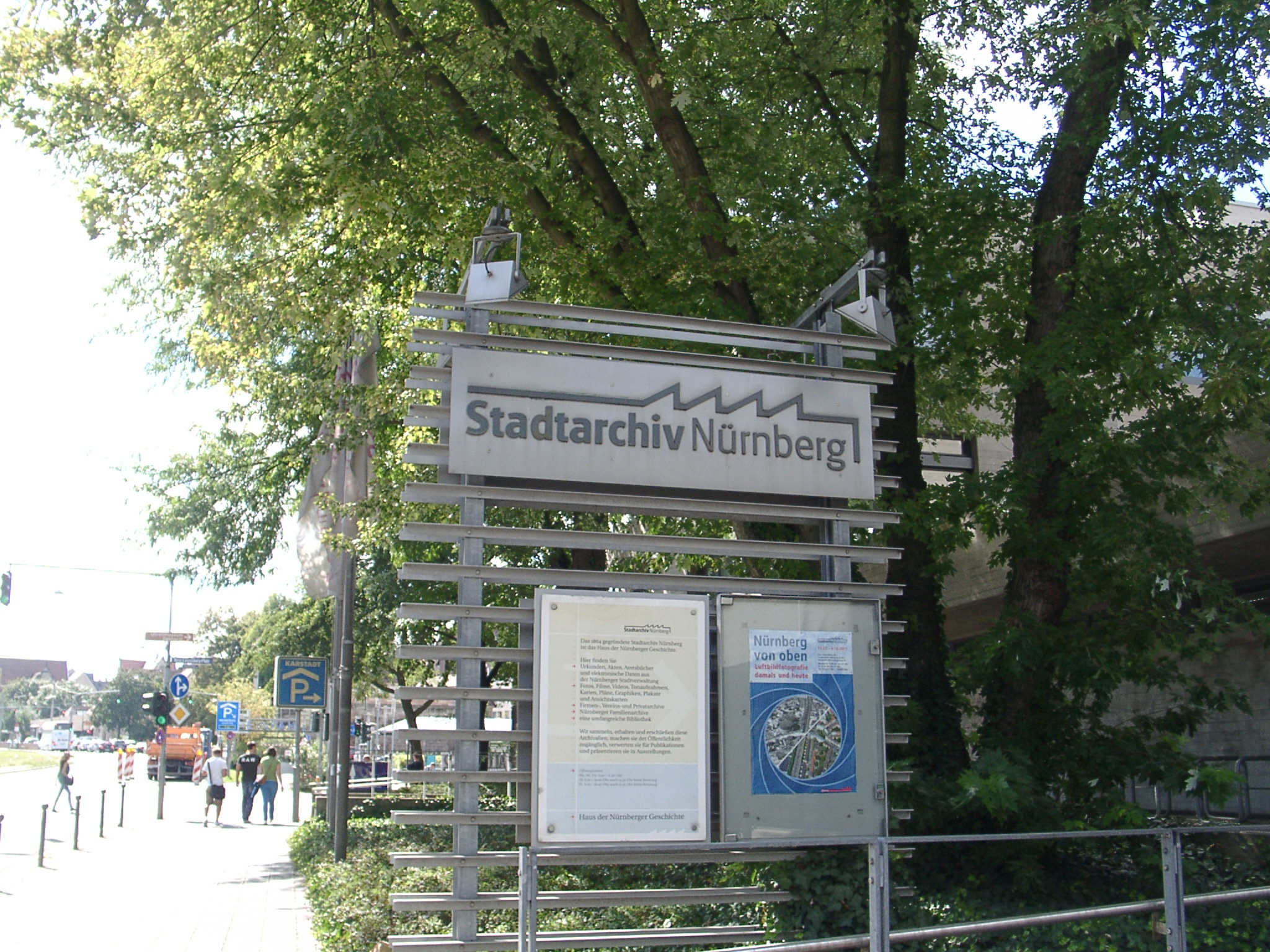 Stadtarchiv Nürnberg